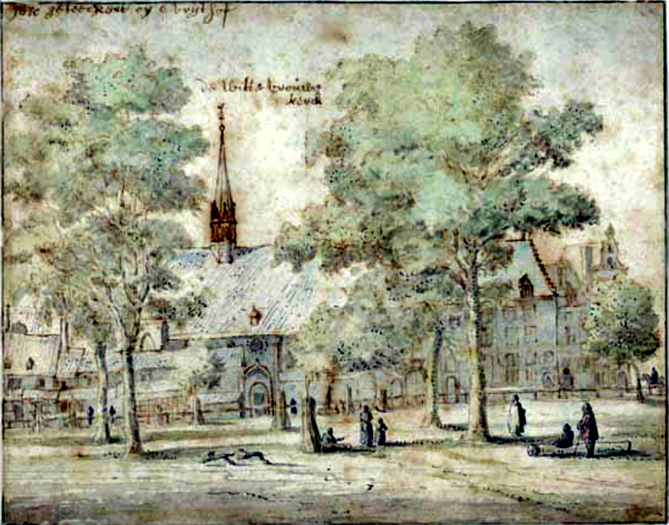 Wittevrouwenklooster, reproductie van tekening Gemeente Archief Maastricht, LGOG 43, RHCL Maastricht.